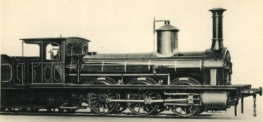 C-Zweizylinder-Nassdampf-Güterzug-Dampflokomotive System Behne-Kool von Hanomag der Braunschweiger EisenbahnAngaben der Hauptabmessungen auf der Rückseite der Postkarte: Spurweite 1435 mm, Treibraddurchmesser 1371 mm, Zylinderdurchmesser 457 mm, Kolbenhub 660 mm, Kesseldruck 9 bar, Rostfläche 2,08 m², Verdampfungsheizfläche: 116,60 m², Leergewicht 36,6 t, Dienstgewicht 40,2 t, Reibungsgewicht: 40,2 t